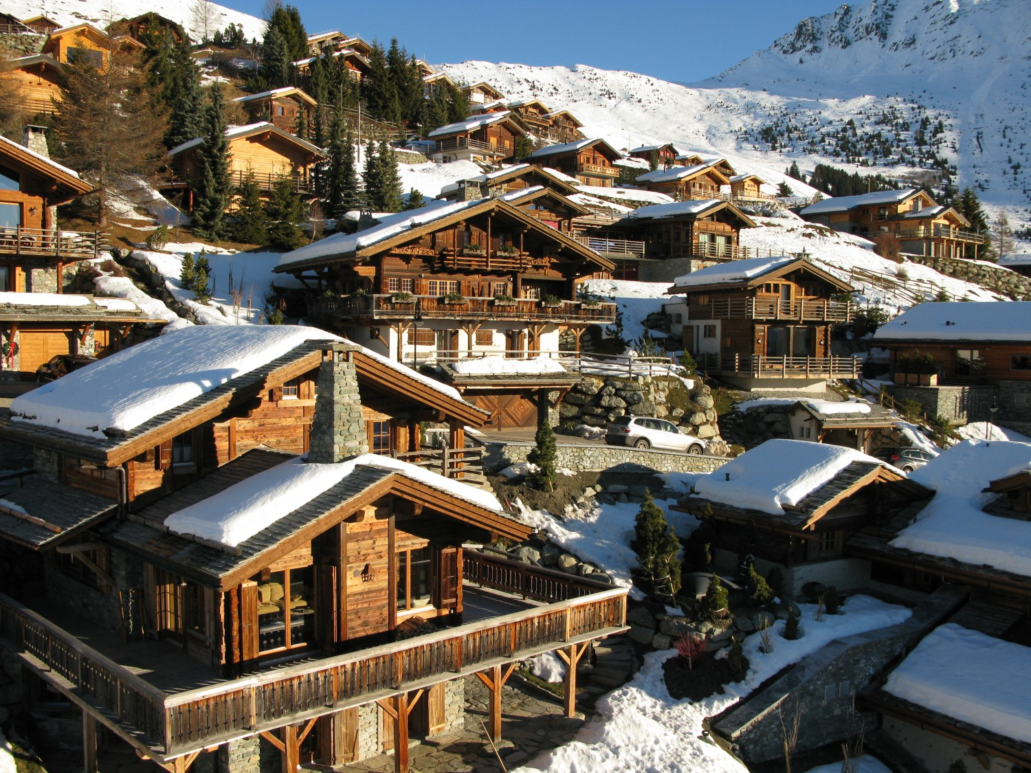 Verbier, Switzerland, 2011.